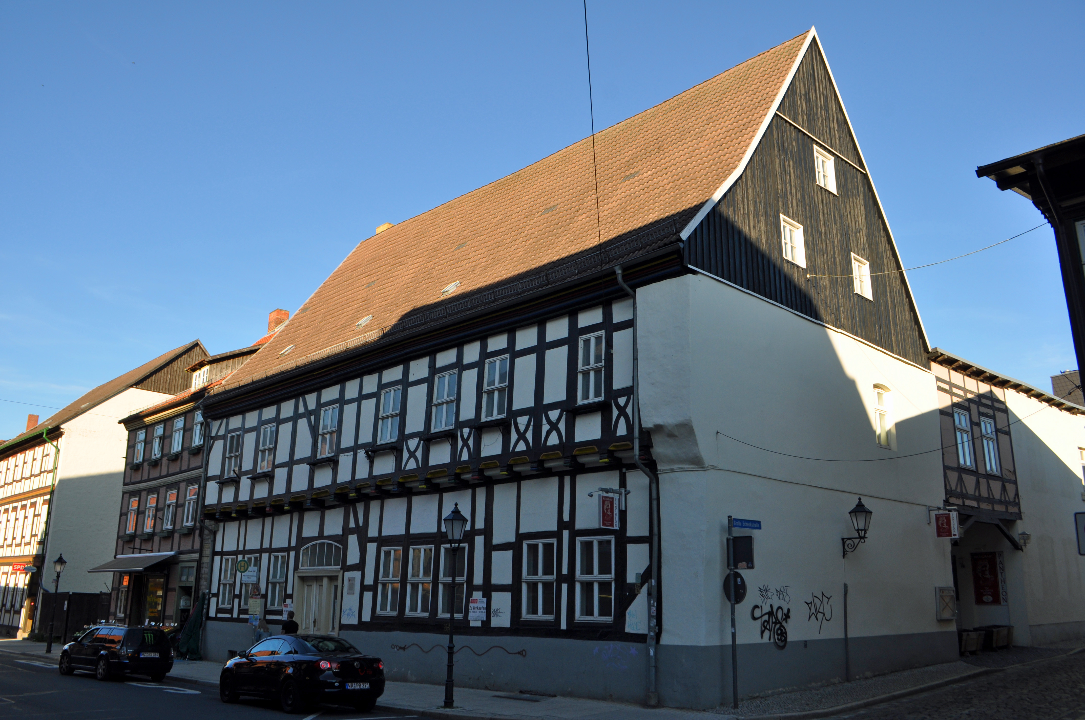 Wernigerode, Breite Straße 80, Neustädter Schänke